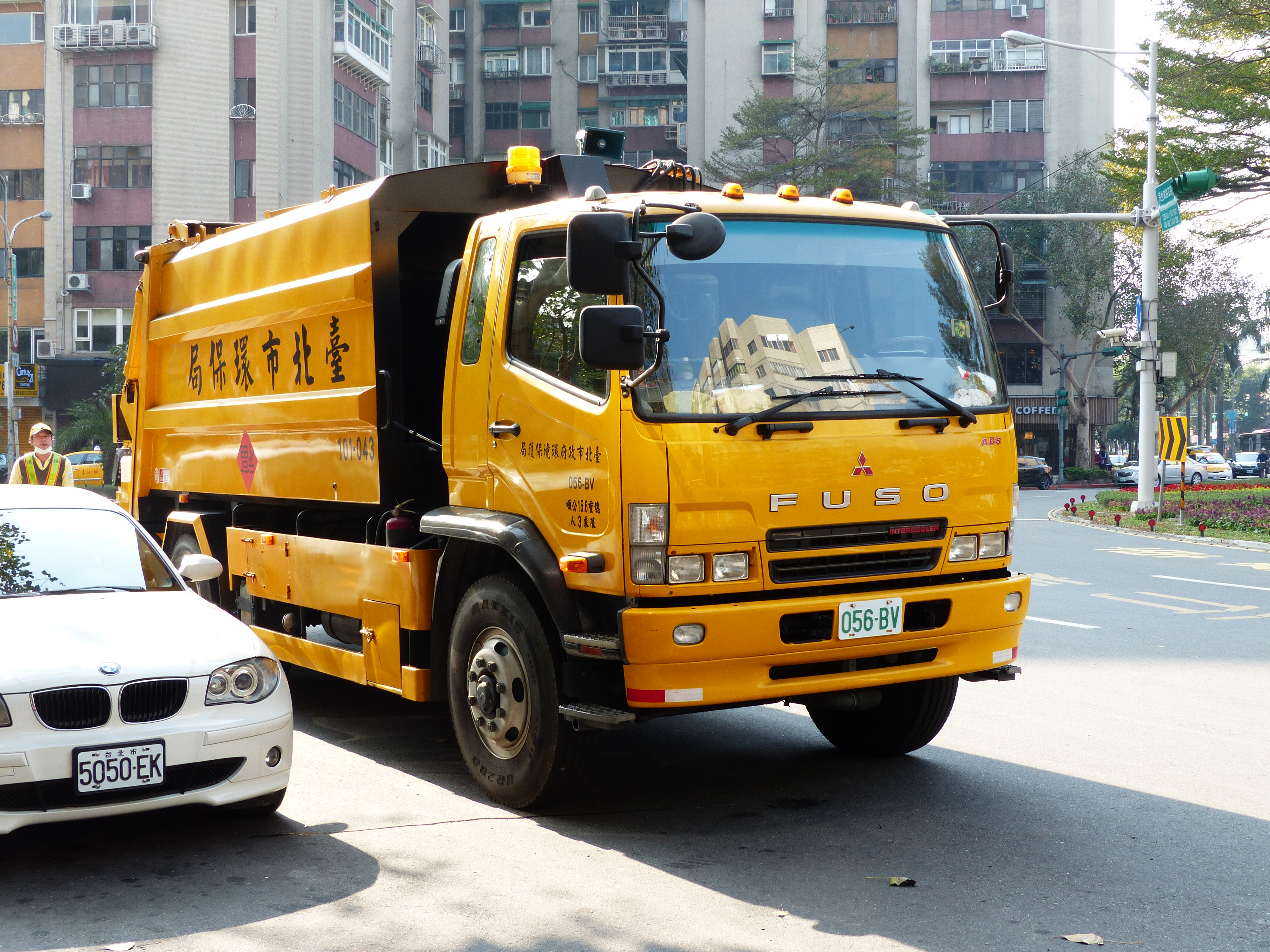 臺北市政府環境保護局三菱Fuso Fighter垃圾車056-BV，攝於臺北市松山區民生東路五段民生圓環。